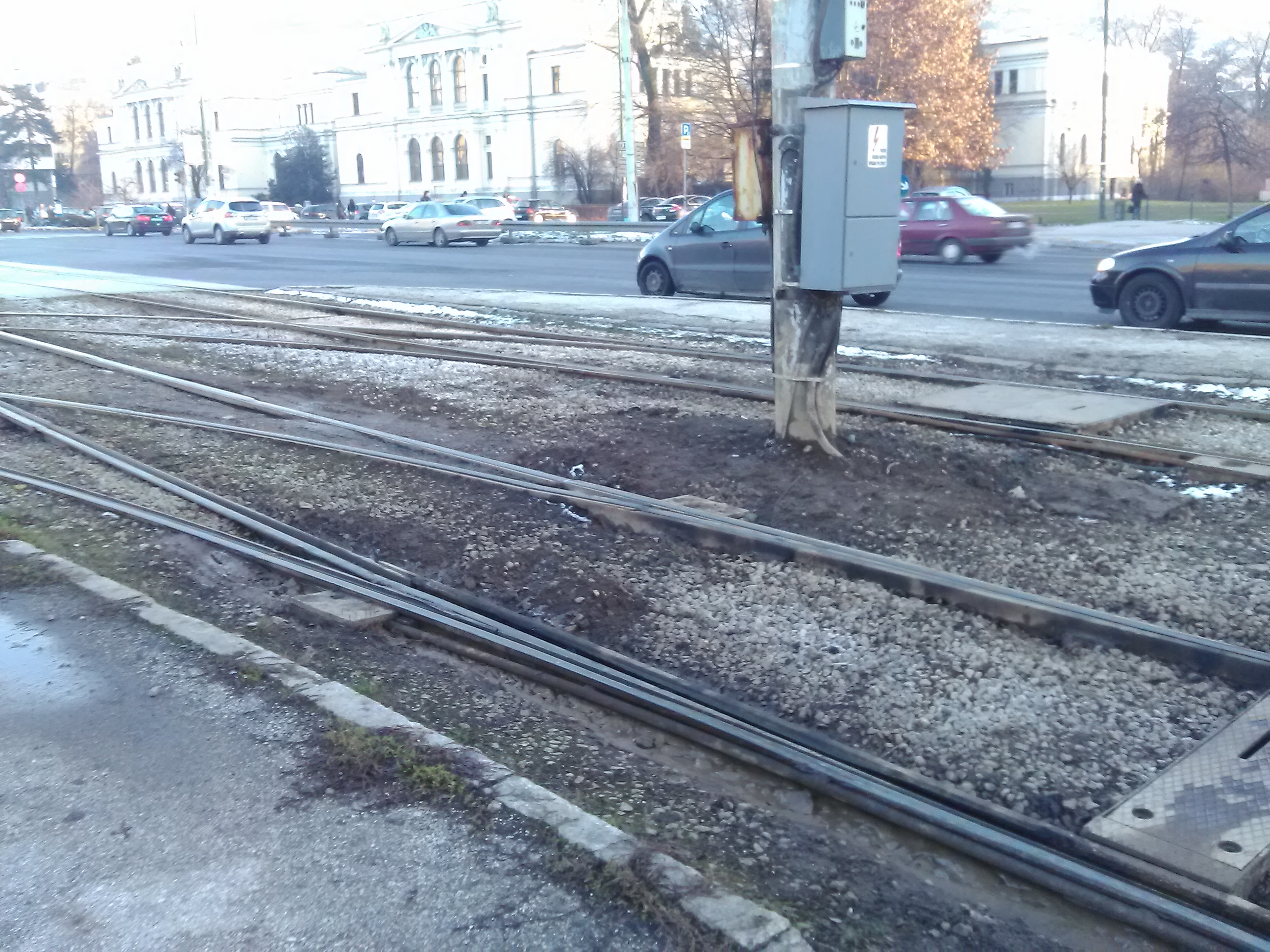 Tramvajska raskrsnica